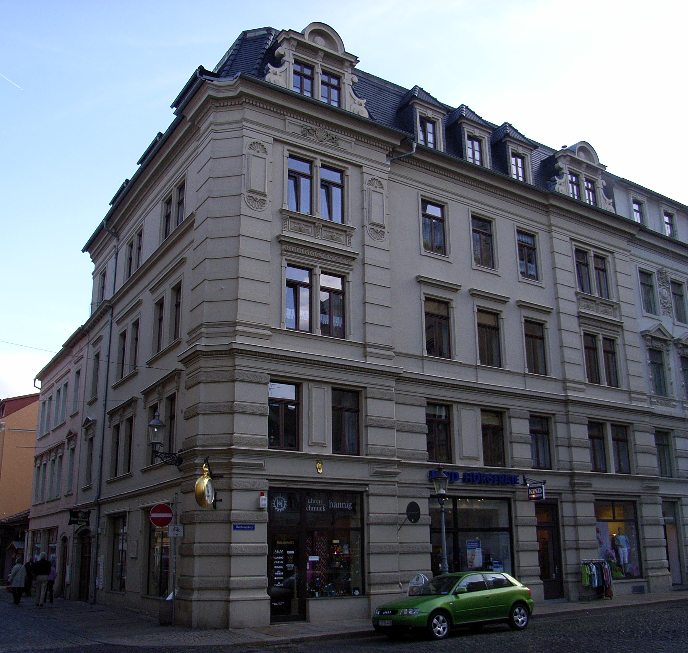 Lisa Tetzners Geburtshaus in Zittau am Rathausplatz, Ecke Reichenberger Straße.